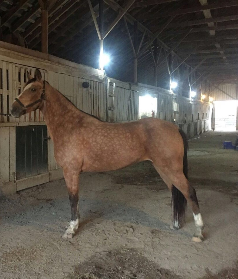 Caballo Tennesee Walking